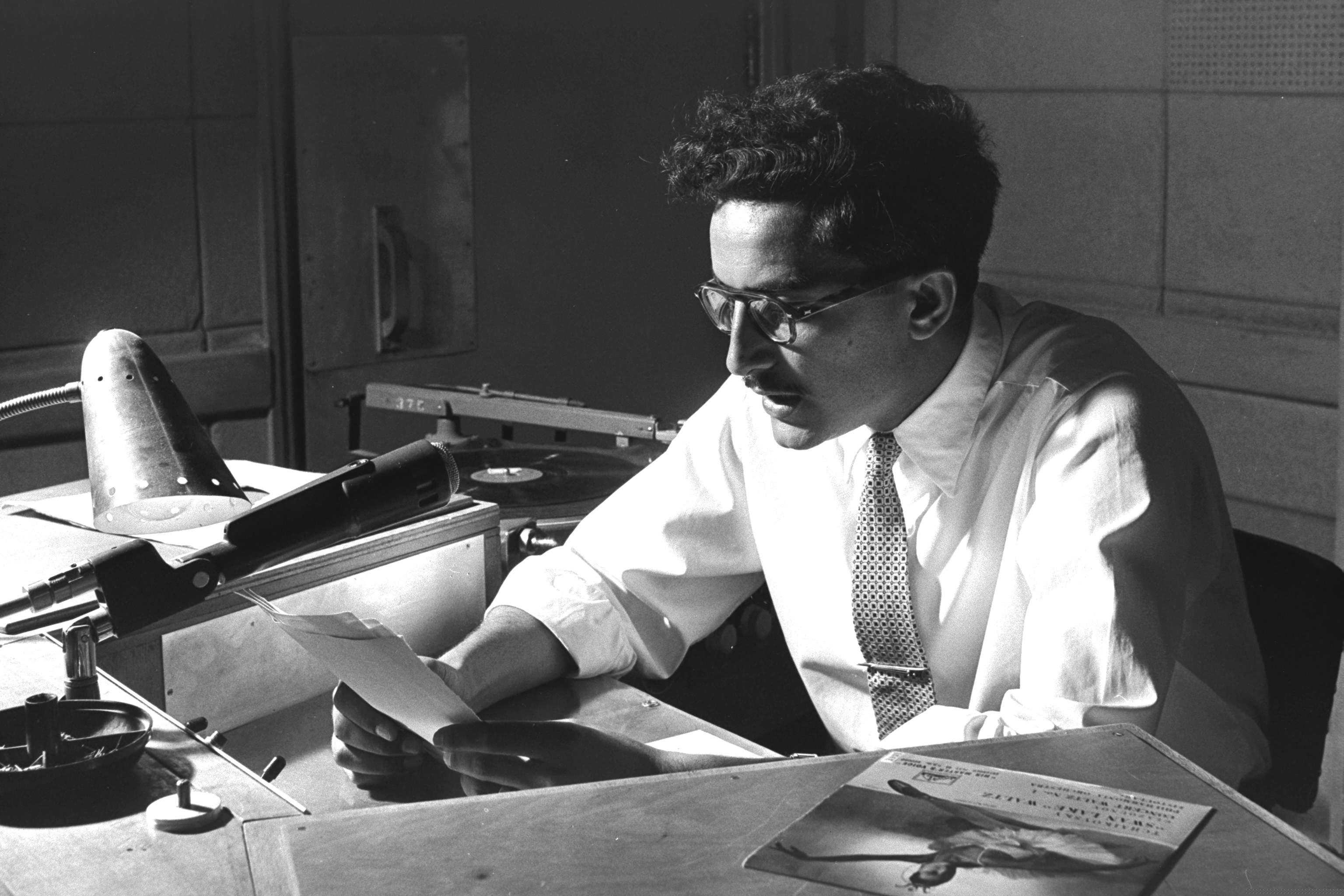 משה חובב קריין קול ישראל, קורא את החדשות.